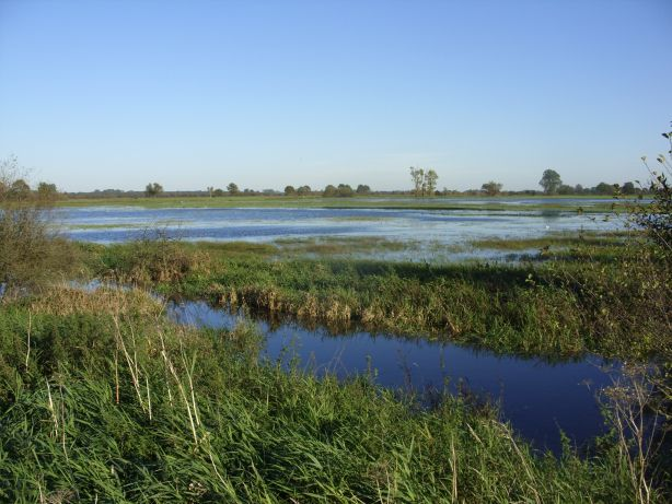 Naturschutzgebiet Borgfelder Wümmewiesen